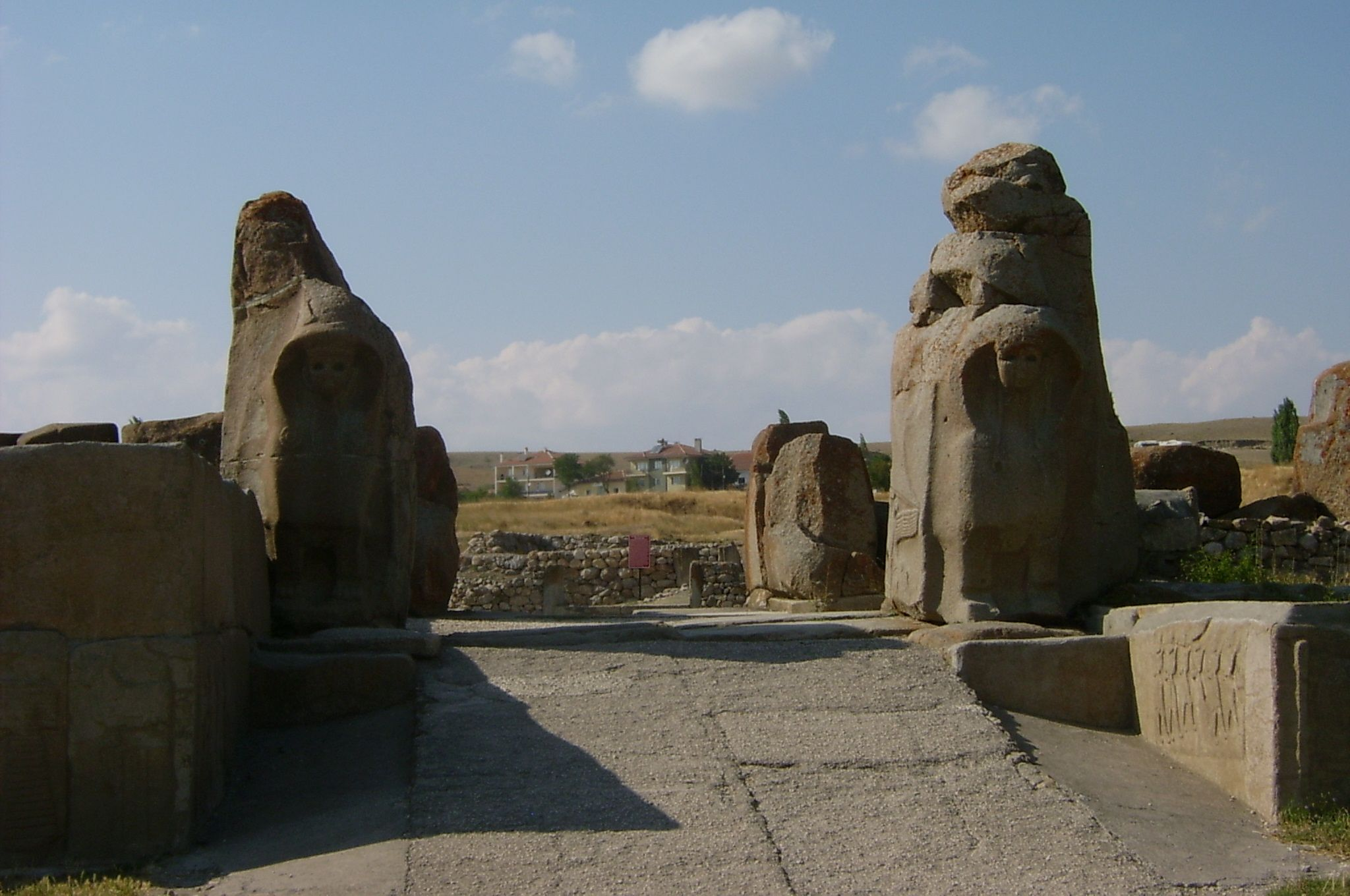 Gates of Alaca Hüyük